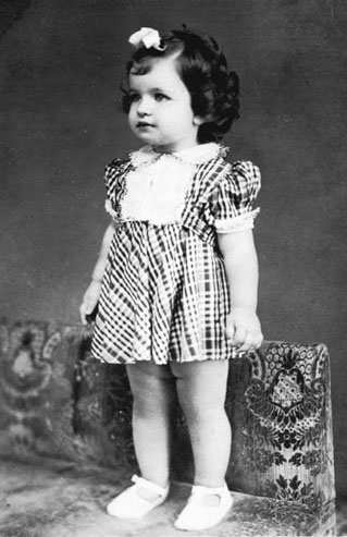 Yeda Crusius em seus primeiros anos de vida. Foto de cerca de 1945.